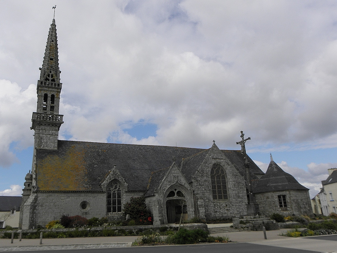 Vue méridionale de l'église Saint-Cadoan de Poullan-sur-Mer (29).